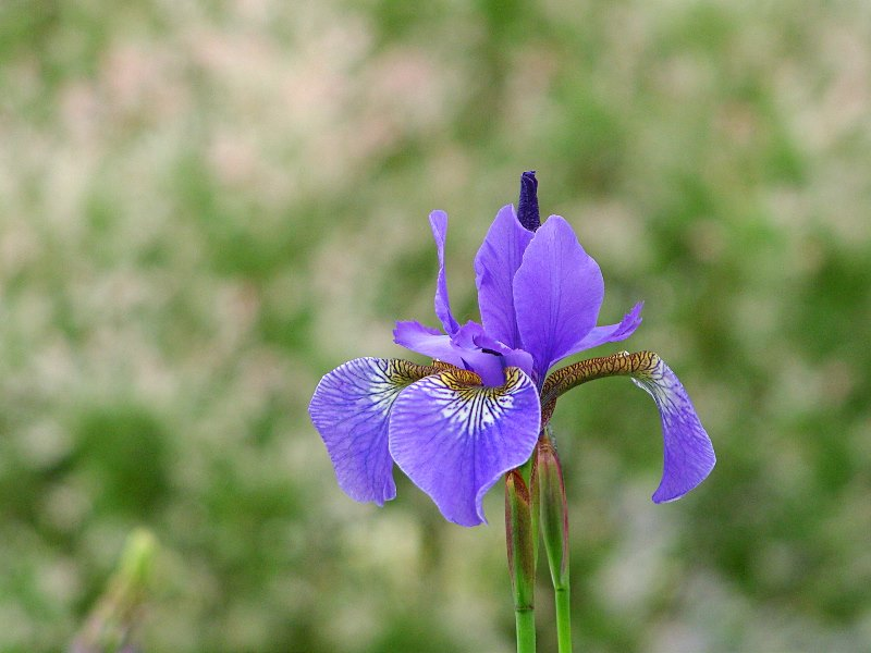 Kosaciec syberyjski (irys syberyjski)